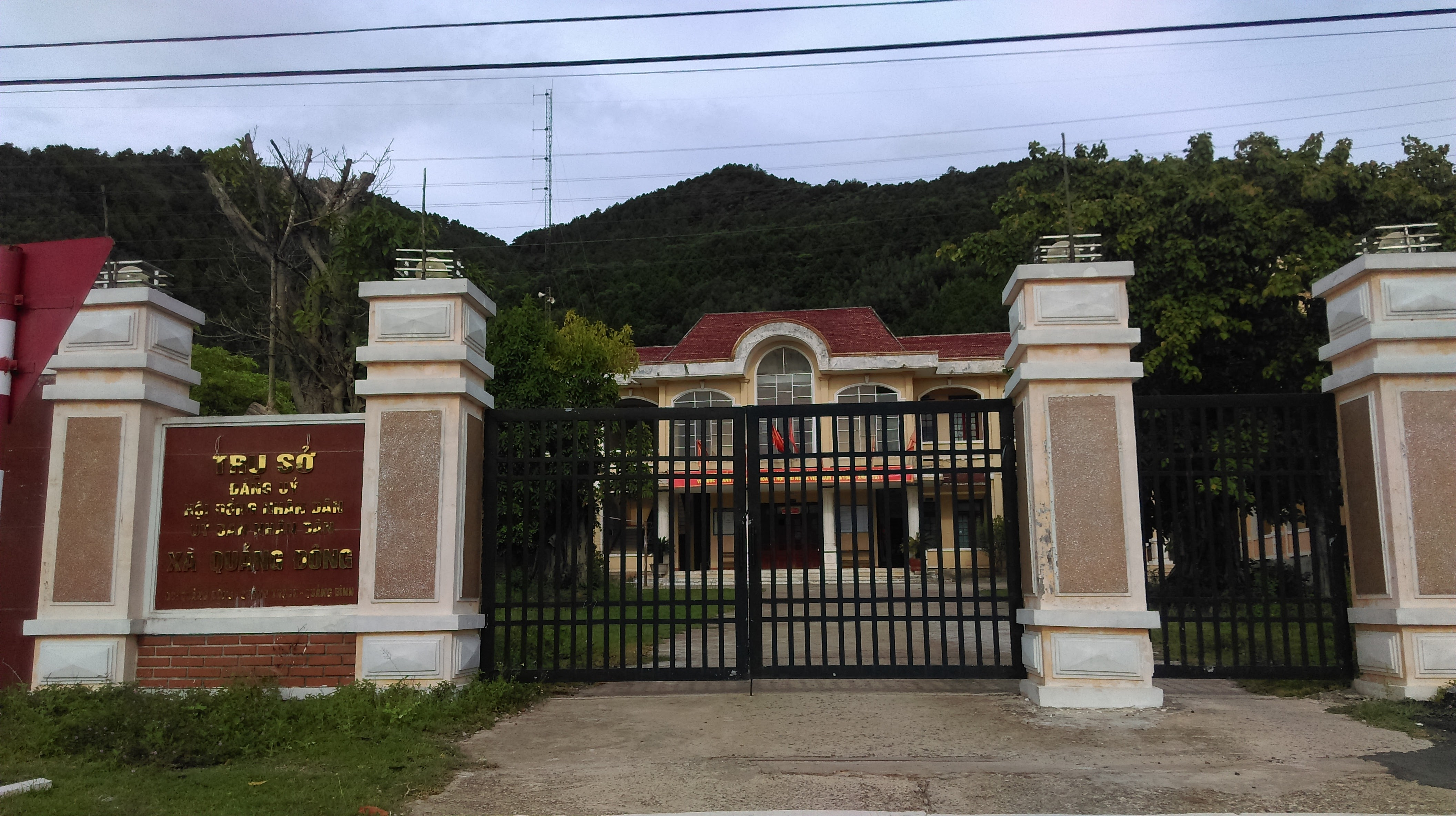 UBND xã Quảng Đông, Quảng Trạch, Quảng Bình